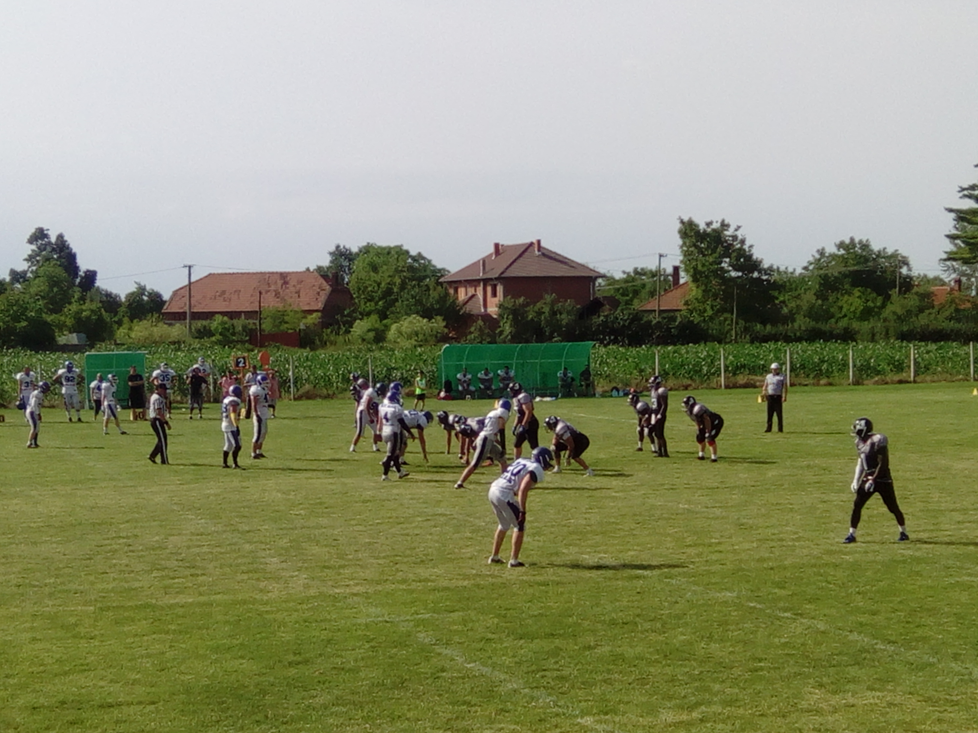 Srpski (latinica): 7. kolo Super lige Srbije u americkom fudbalu u Brzanu Wild Boars Kragujevac - Blue Dragons Beograd.